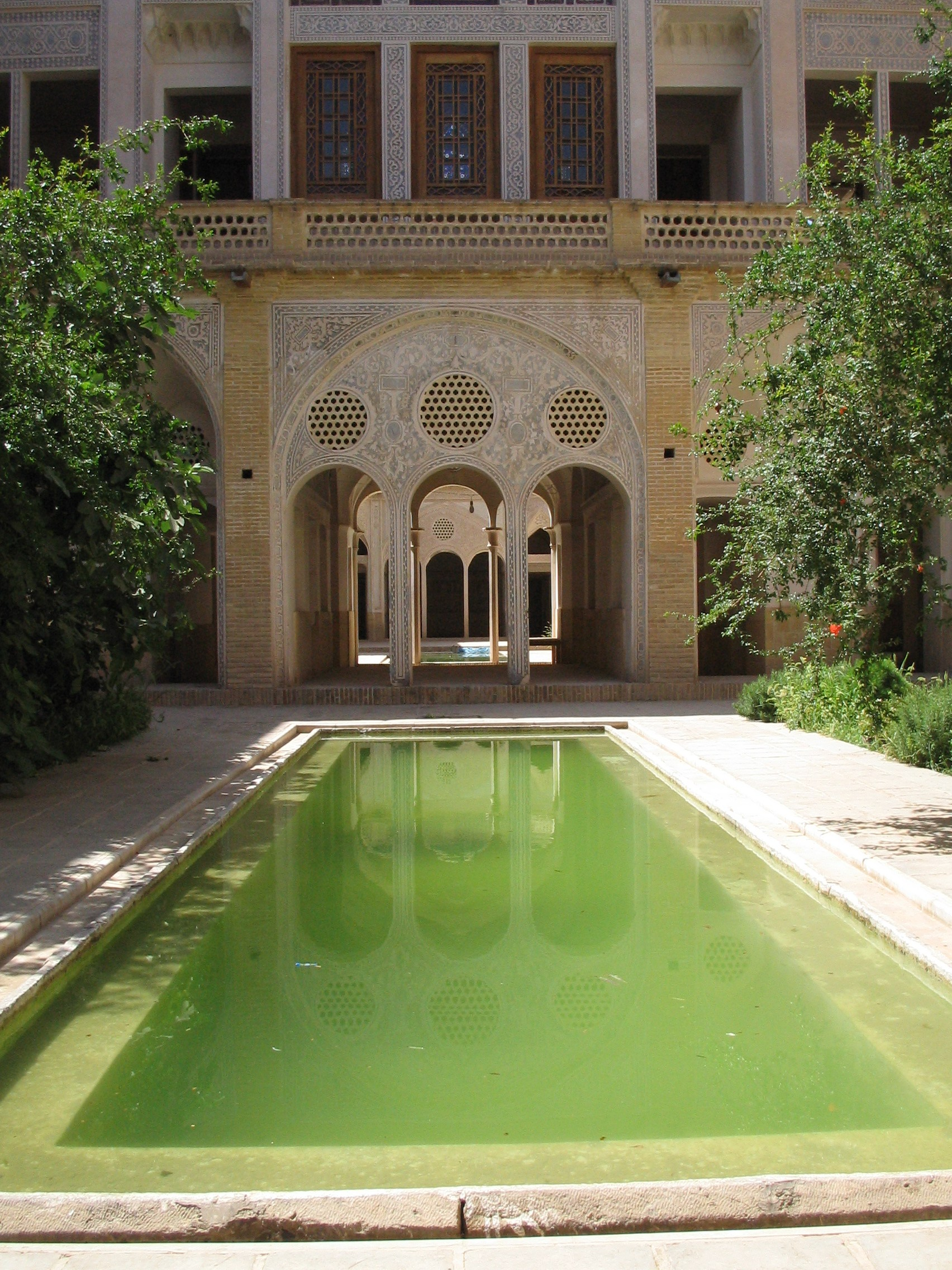 Khaneh Abbasi, Kashan, Iran.